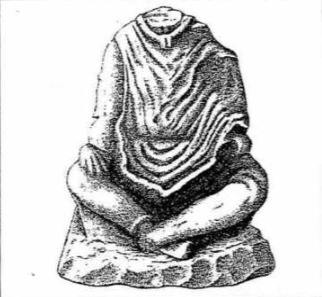 Cassinomagus (Chassenon), Charente, France. Statue mutilée de dieu gaulois trouvée en 1895 dans un puits à la ferme Coldebœuf, route du Maine (lieu de trouvaille donné dans Barrière (1937), « Une bourgade gallo-romaine : Chassenon, ses monuments et ses puits », p. 252).